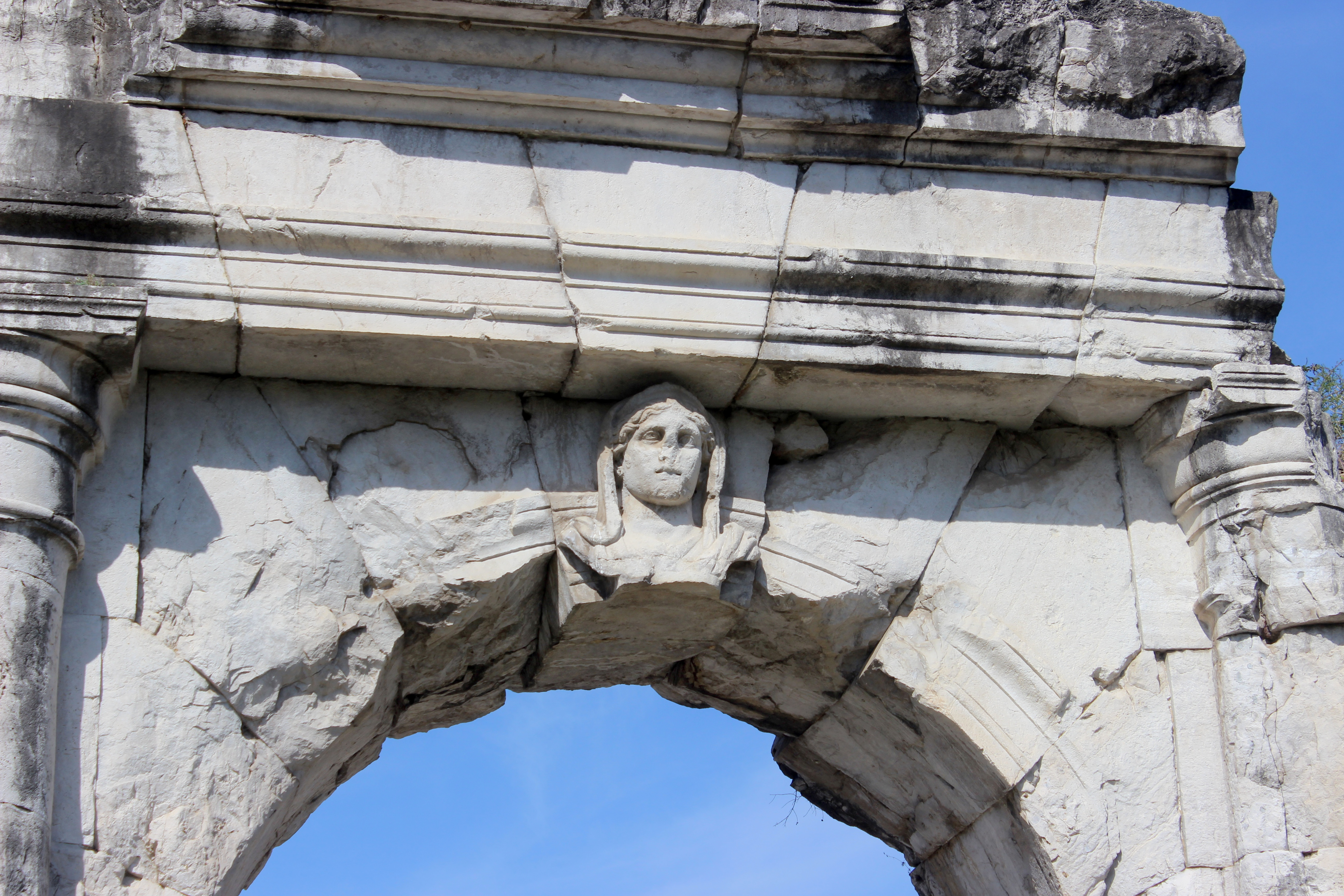 Santa Maria Capua Vetere. Anfiteatro.